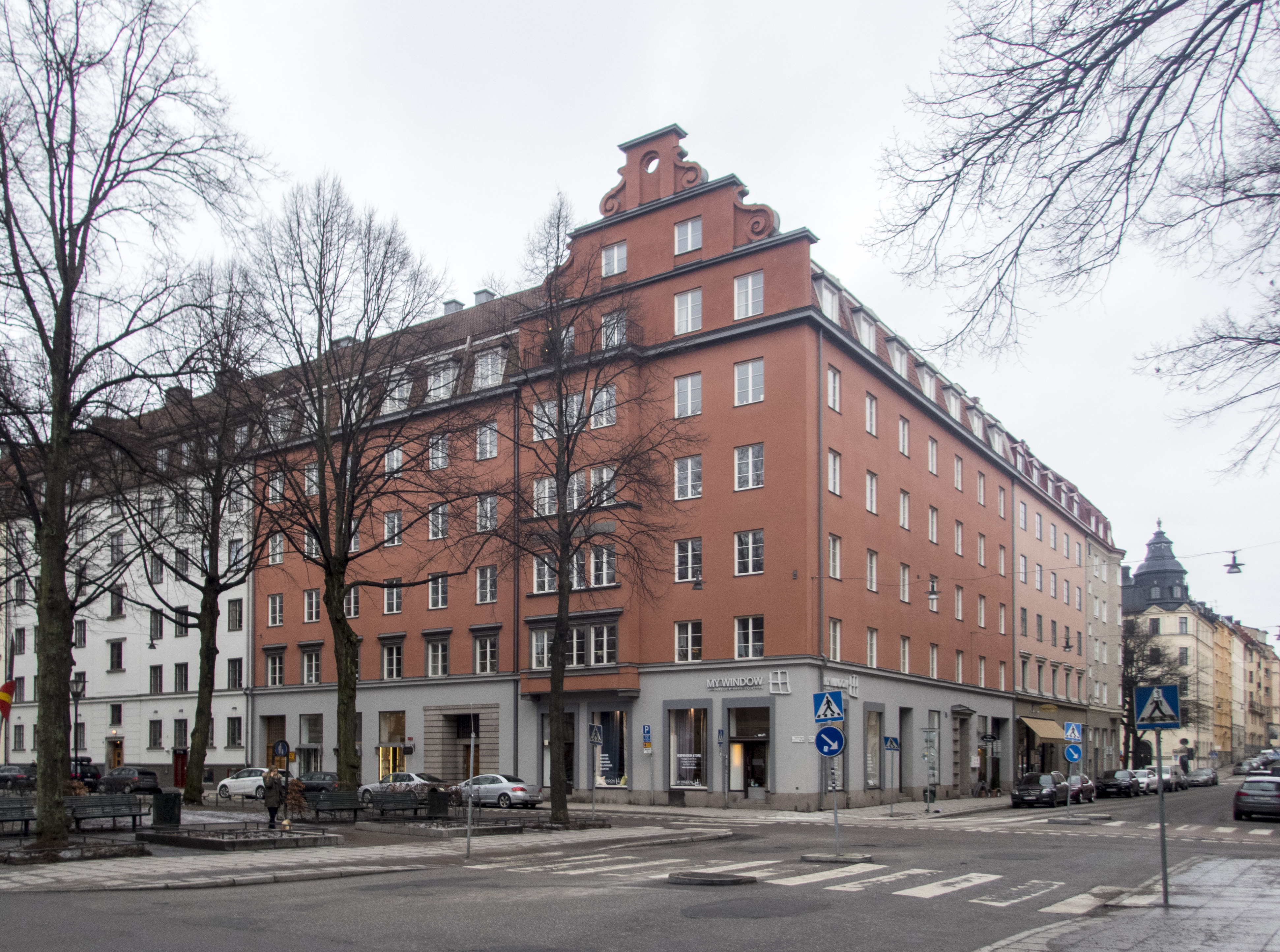 Brandvakten 3 Artillerigatan 58, Karlavägen 66 Stockholm, Nybyggnadsår 1924 - 1925 J. Carlsson (Byggherre) Kreuger & Bärlin (Byggmästare) Ture Sellman (Arkitekt)